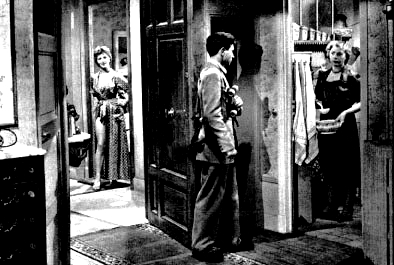 Delia Scala, Jacques Chabassol e Line Noro in "Prima del diluvio" (Cayatte 1954)